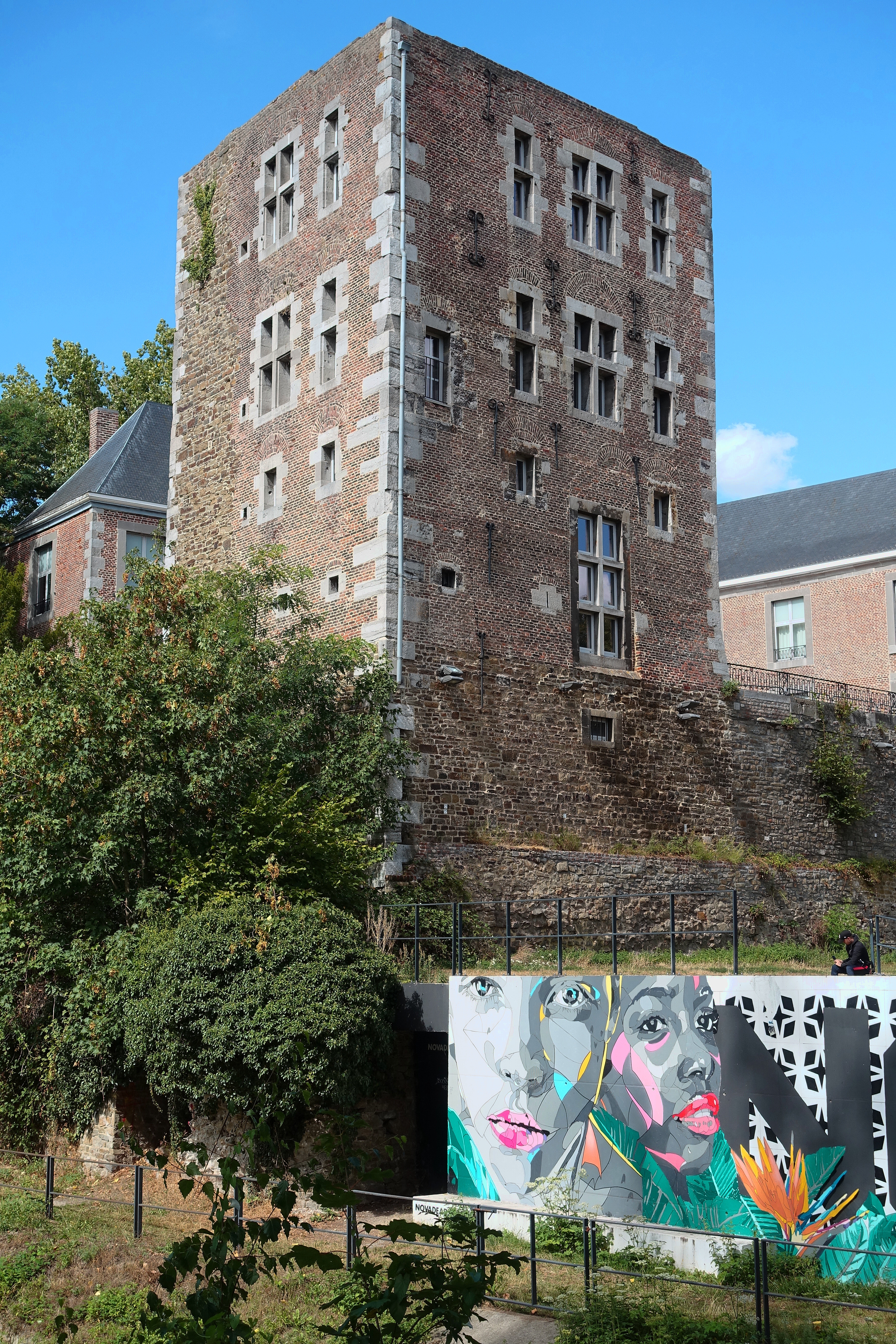 Middeleeuwse donjon waarschijnlijk uit de 12de of 13de eeuw, verbouwd in de 17de eeuw